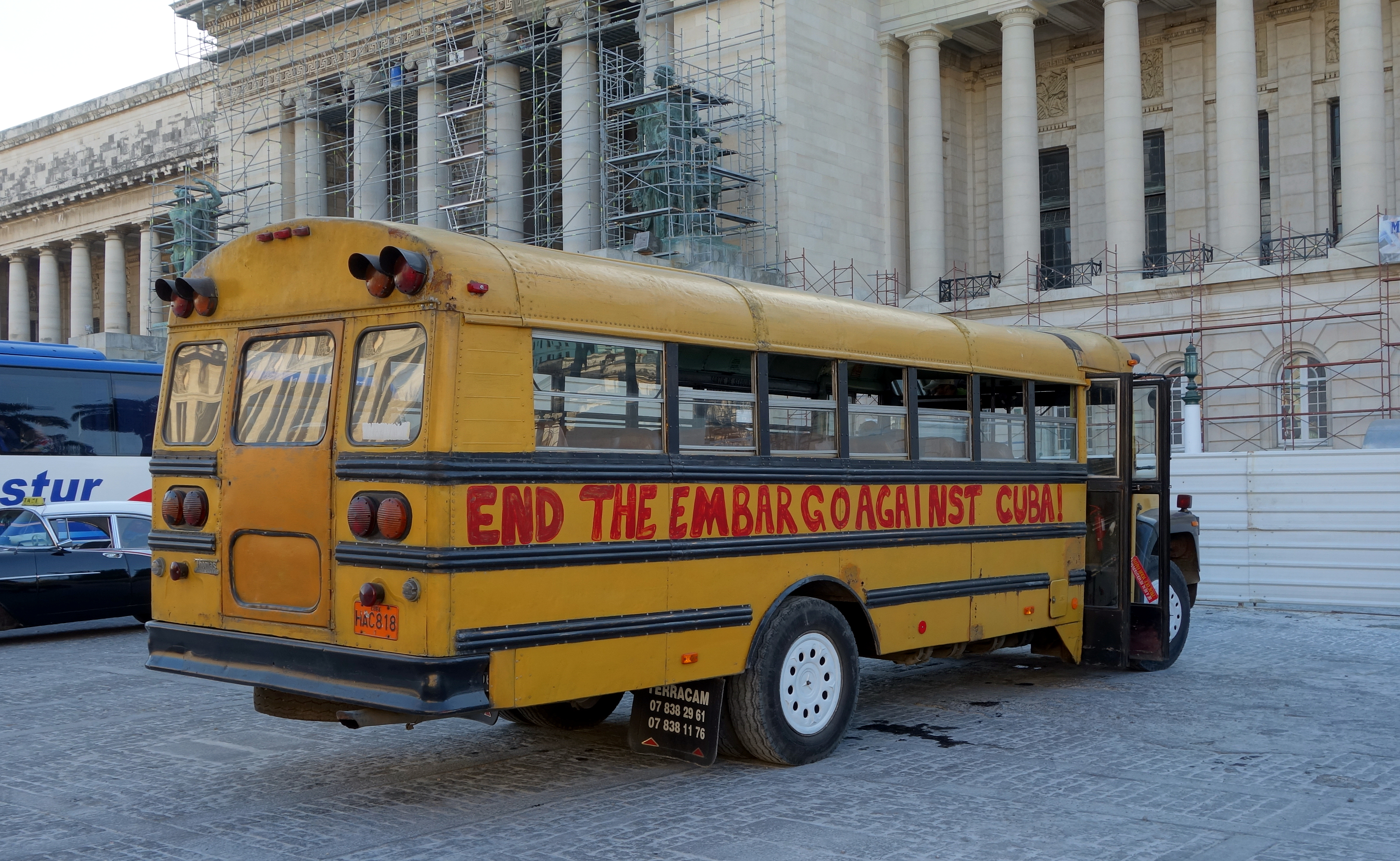 Un autobus à La Havane.